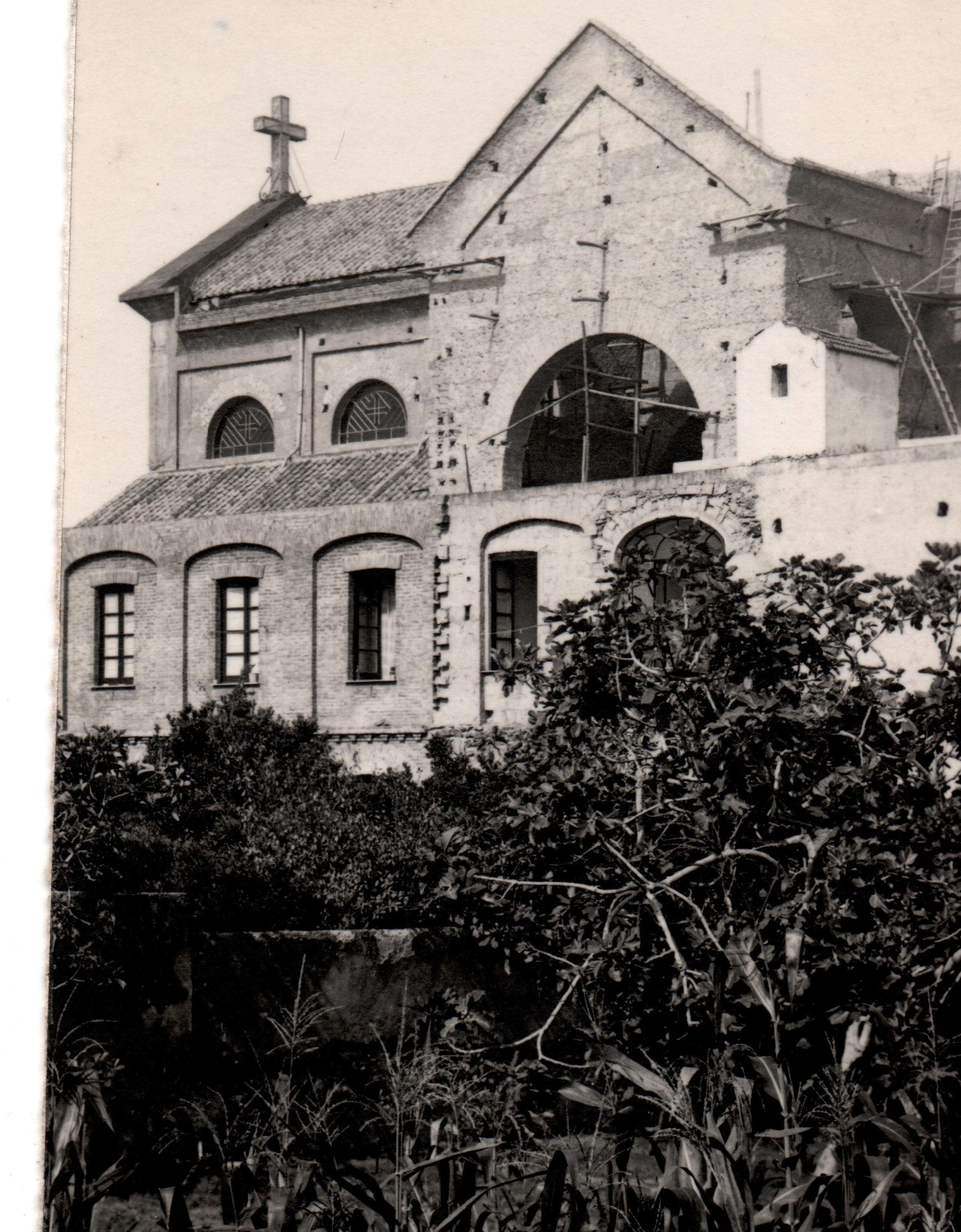 Cantiere chiesa